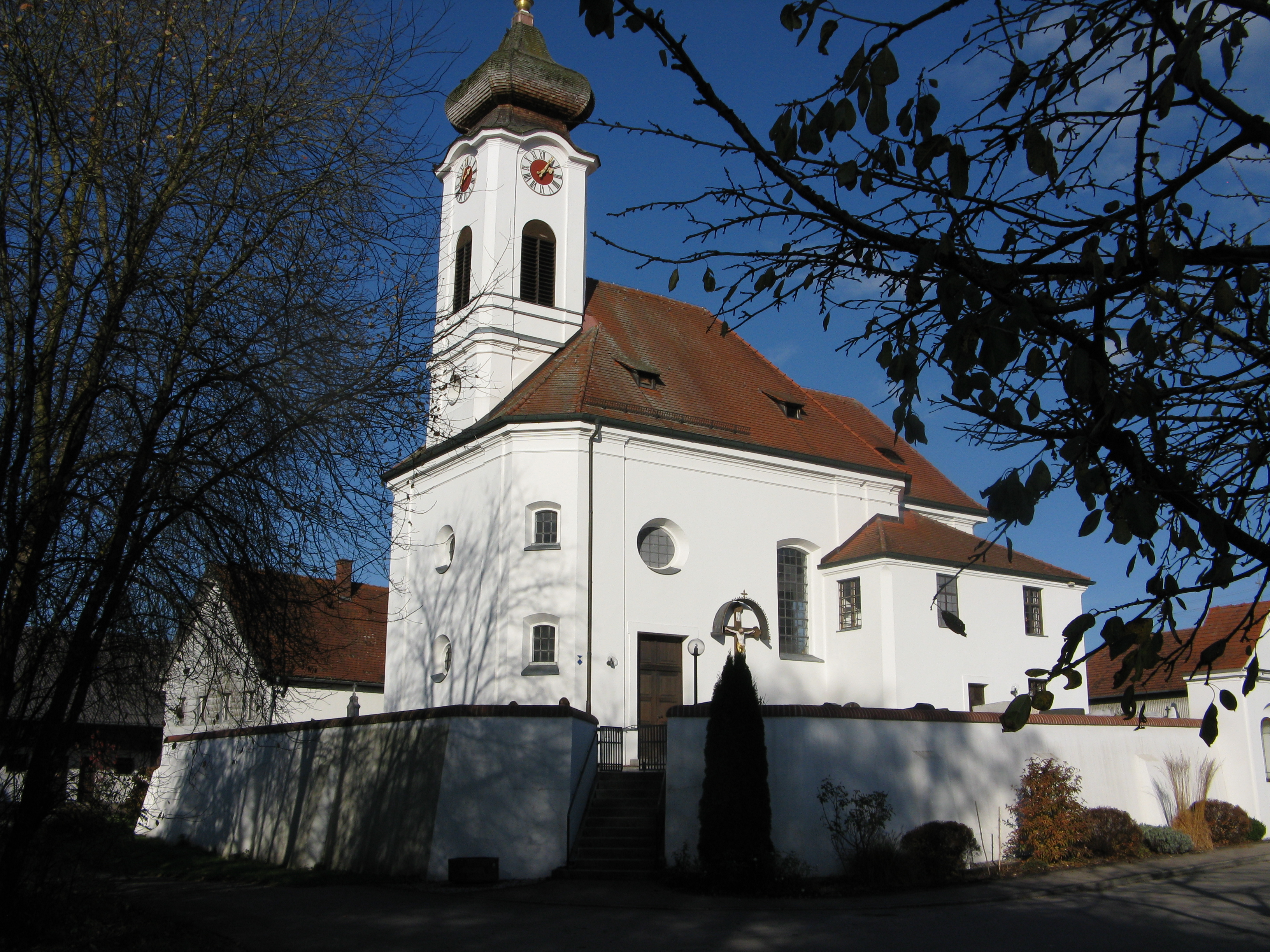 Kirche St. Vitalis in Sigmertshausen, Röhrmoos. Ehemalige Wallfahrtskirche.